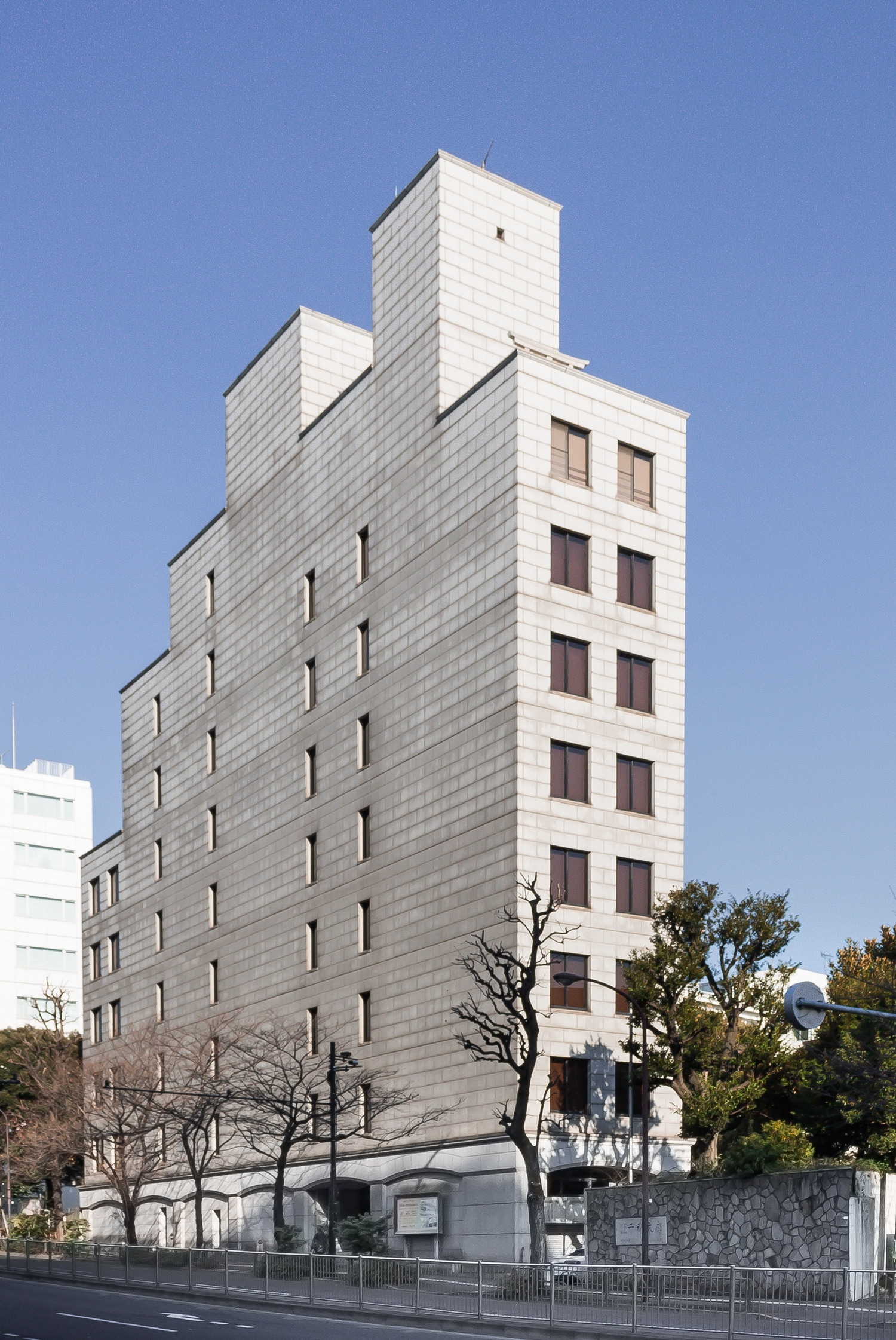 千秋文庫（東京都千代田区）。